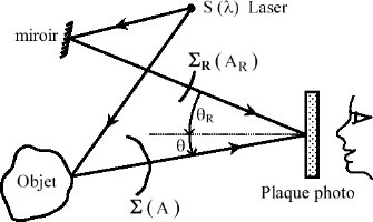 Description : Principe de l'écriture d'un hologramme Source : Personnelle Statut